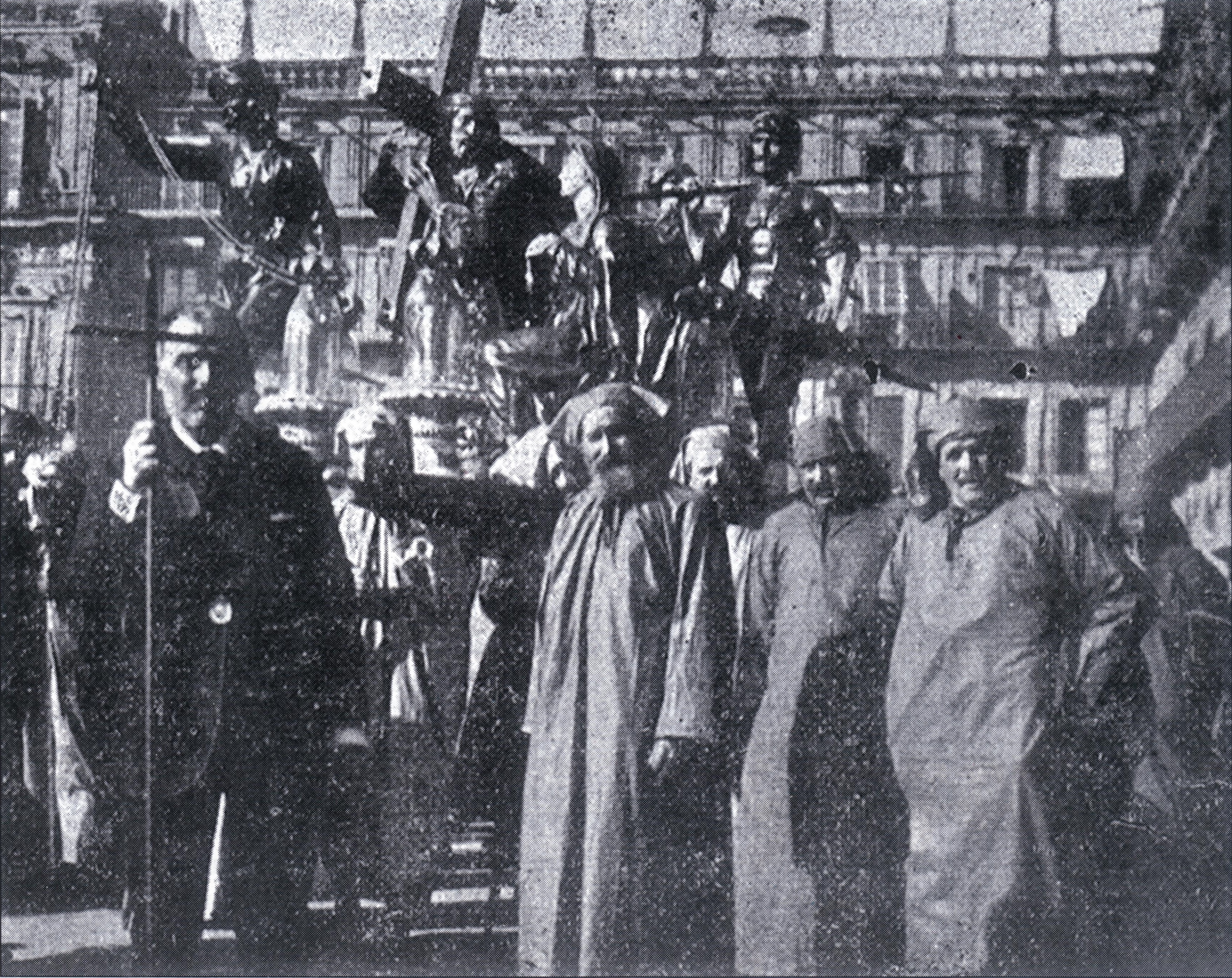 Paso de la Congregación de Jesús Nazareno de Salamanca, en la procesión del Santo Entierro celebrada el Viernes Santo 8 de abril de 1898 a su paso por la Plaza Mayor.